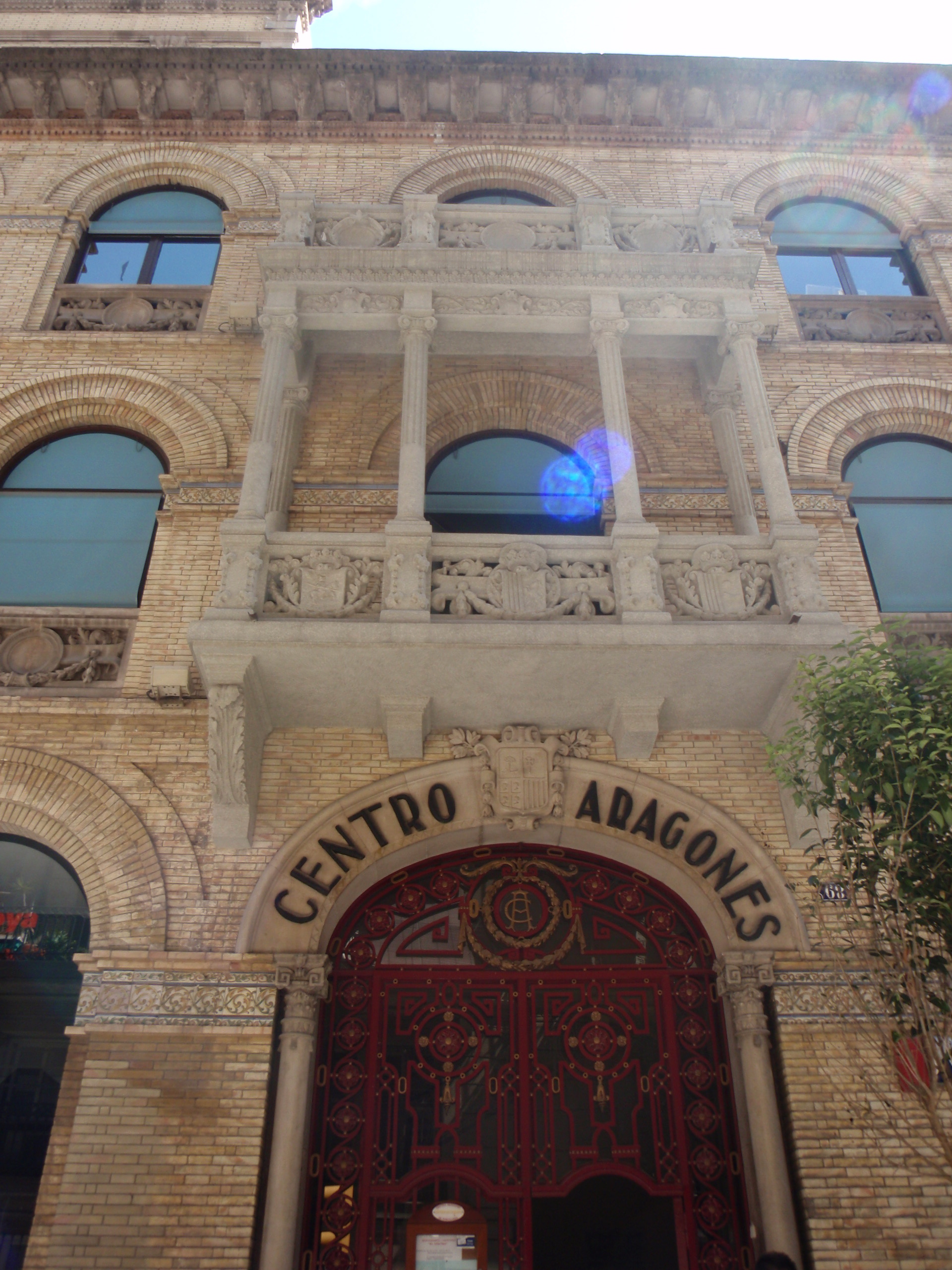 Entrada del Centro Aragonés de Barcelona (España), situado en la Calle de Joaquín Costa nº 68